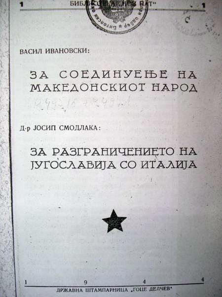 Корица на брошурата на Васил Ивановски „За съединение на македонския народ“ и на Йосип Смодлака „За разграничението на Югославия с Италия“.